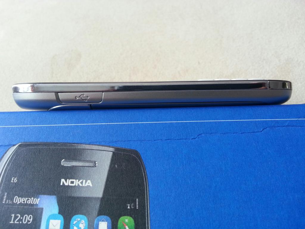 Nokia E6 biała lewy bok